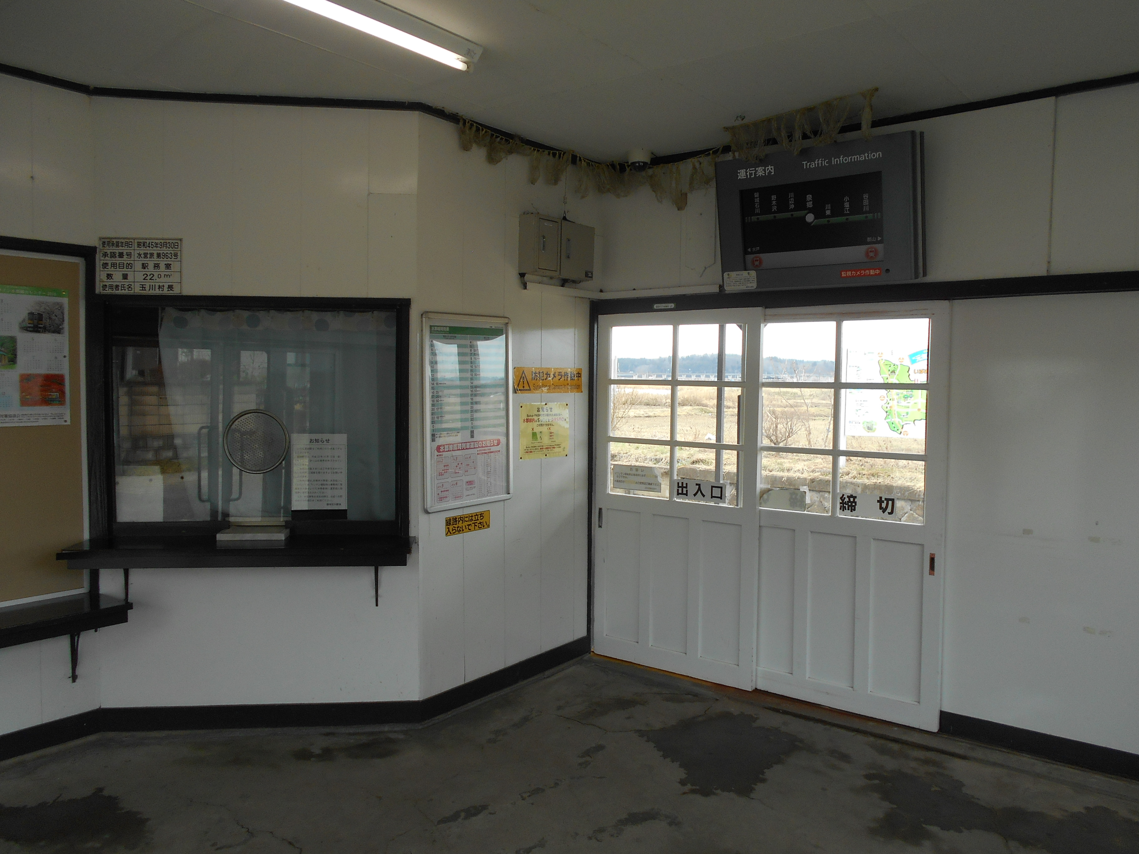 泉郷駅舎内